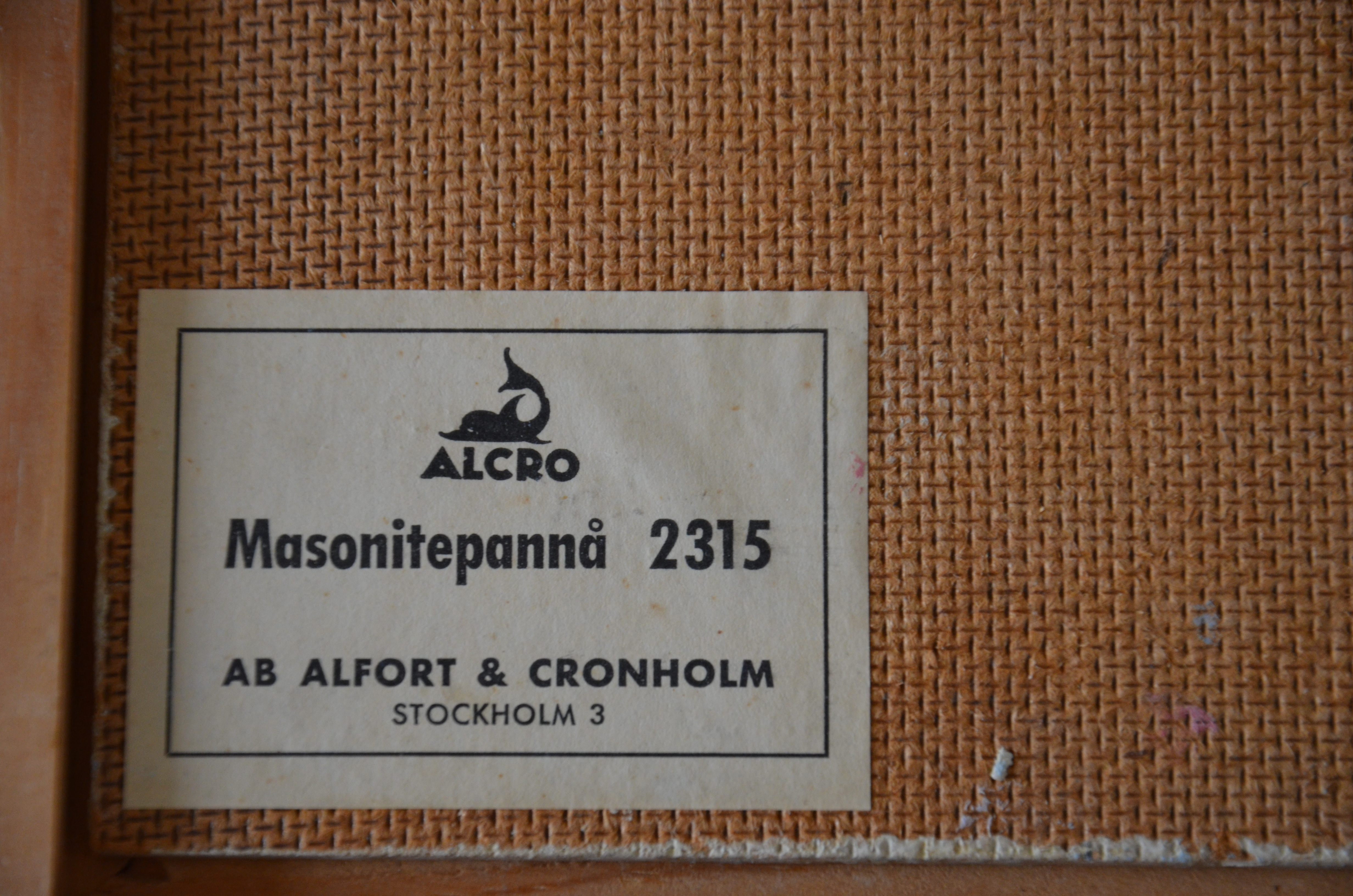 Pannå av masonit